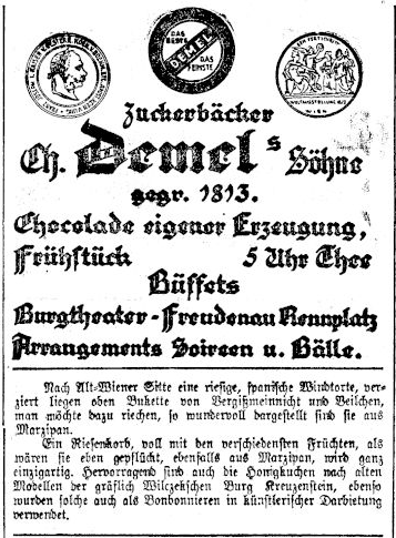 Zuckerbäcker Ch. Demel's Söhne, Spanische Windtorte auf der Ersten Wiener Konditorei Ausstellung 1.-9. Okt. 1932 Schönbrunn-Dreherpark, Neue Freie Presse, 5. Oktober 1932, Nr. 24448, Seite 8.